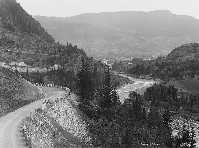 Valdres, Bagn med Fjeldheim